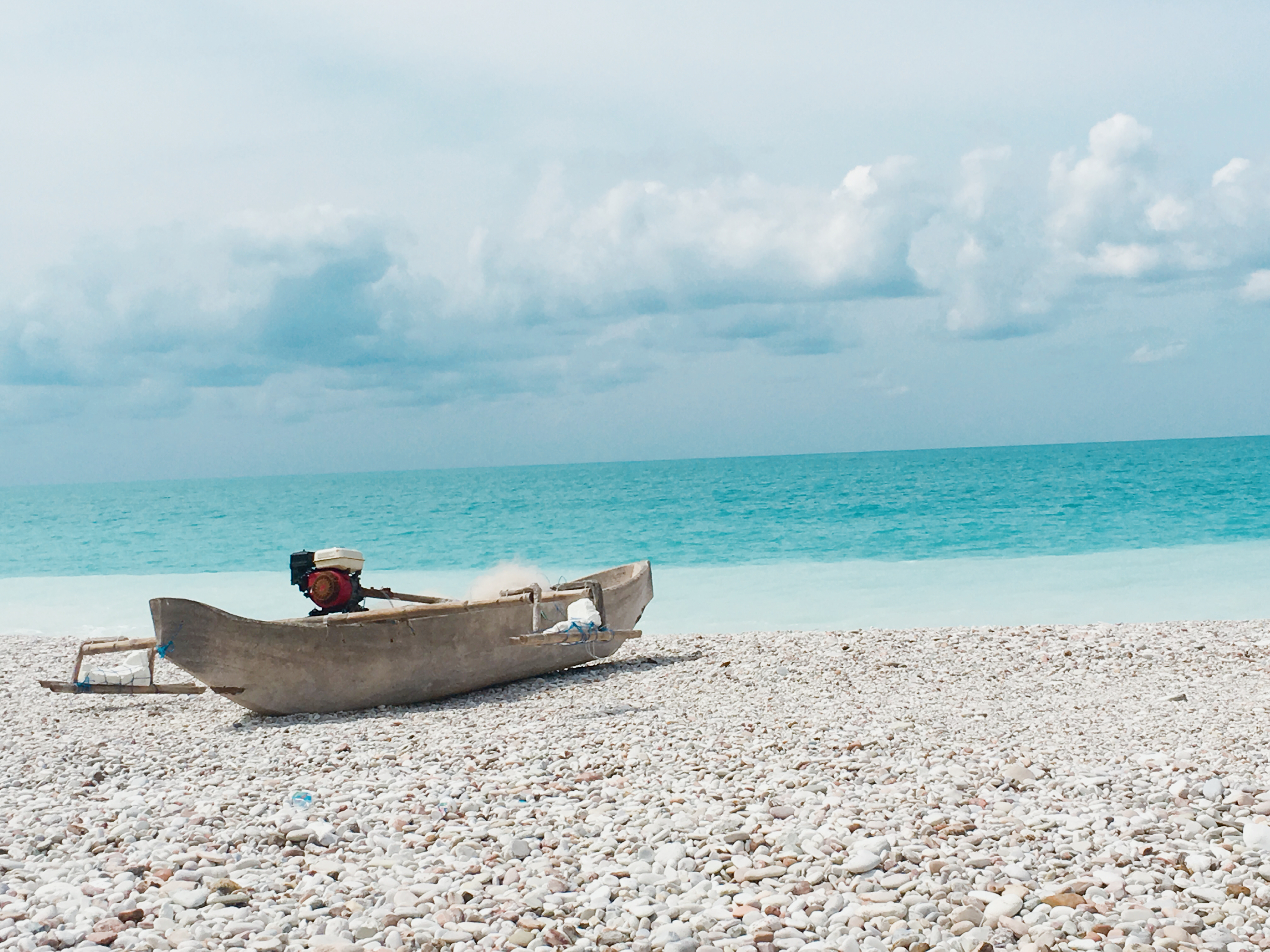 Batu yang indah